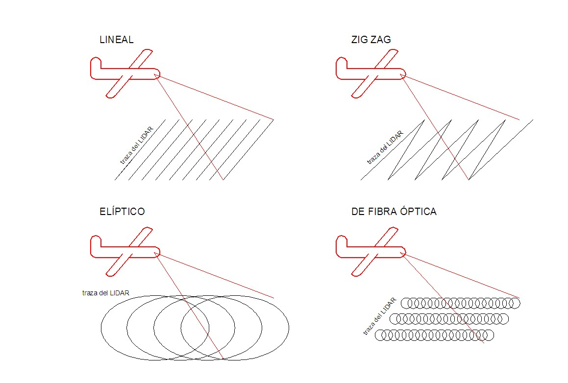 Tipos de LIDAR según traza